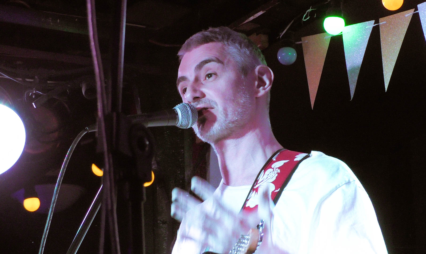 23.08.2017. Китайский лётчик Джао Да - День рождения клуба "Китайский лётчик Джао Да".